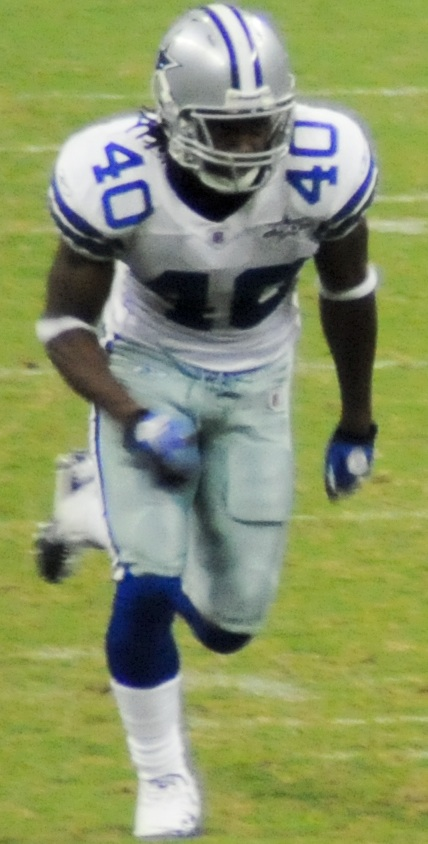 DSC_7485_LR